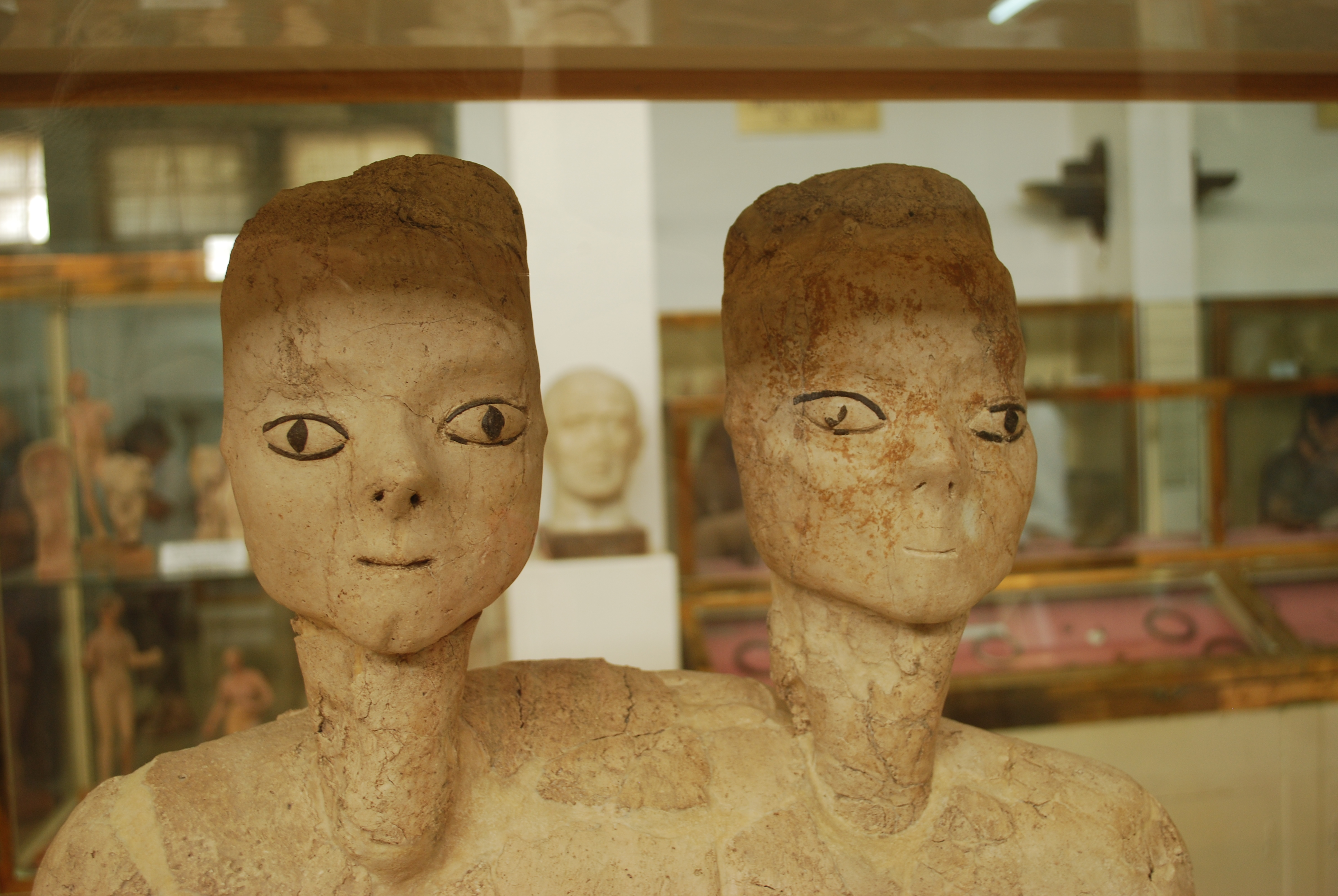 Les statues d'Ain Ghazal, au Musée archéologique de Jordanie (Citadelle d'Amman).